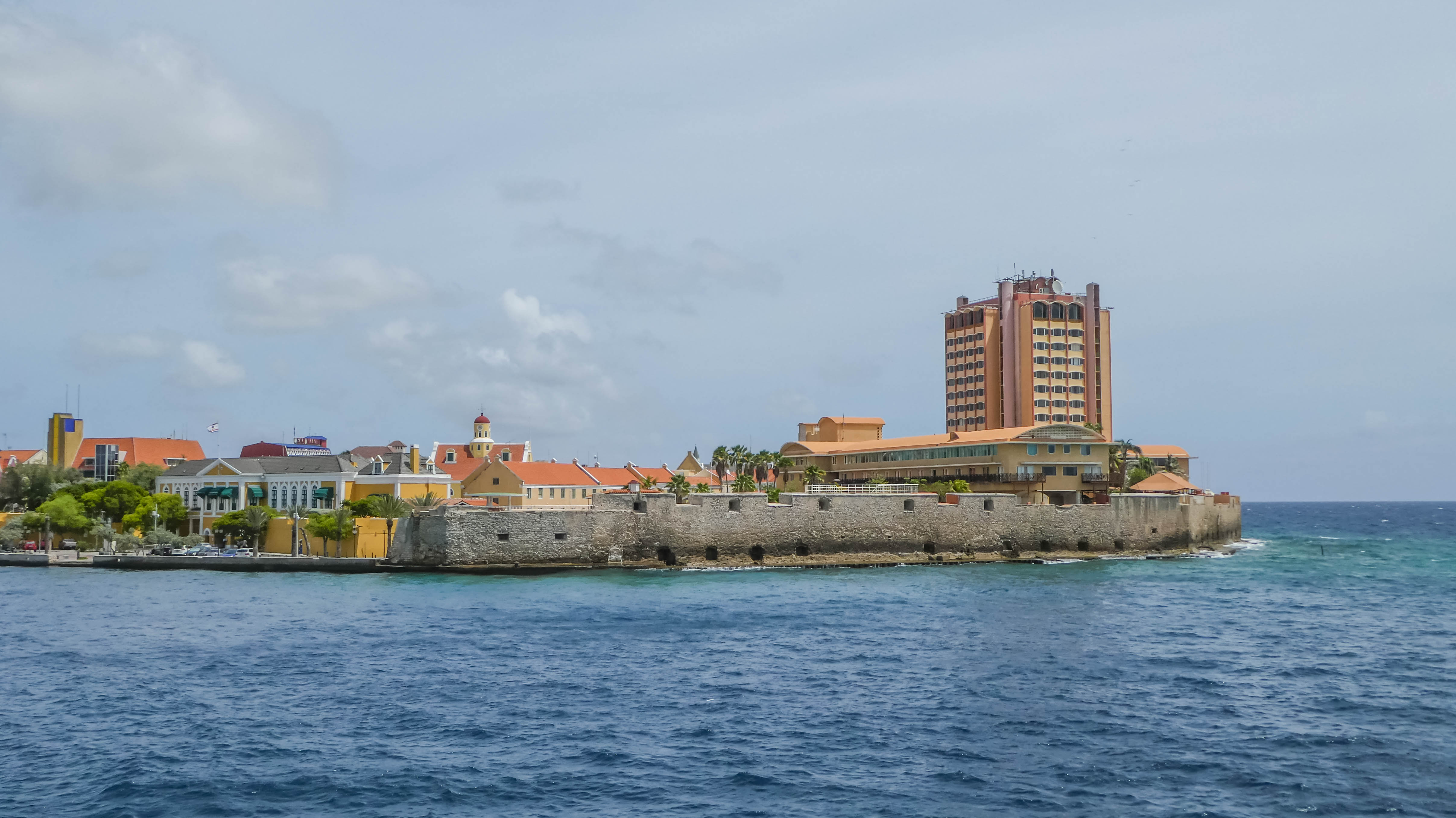 Waterfort, Willemstad